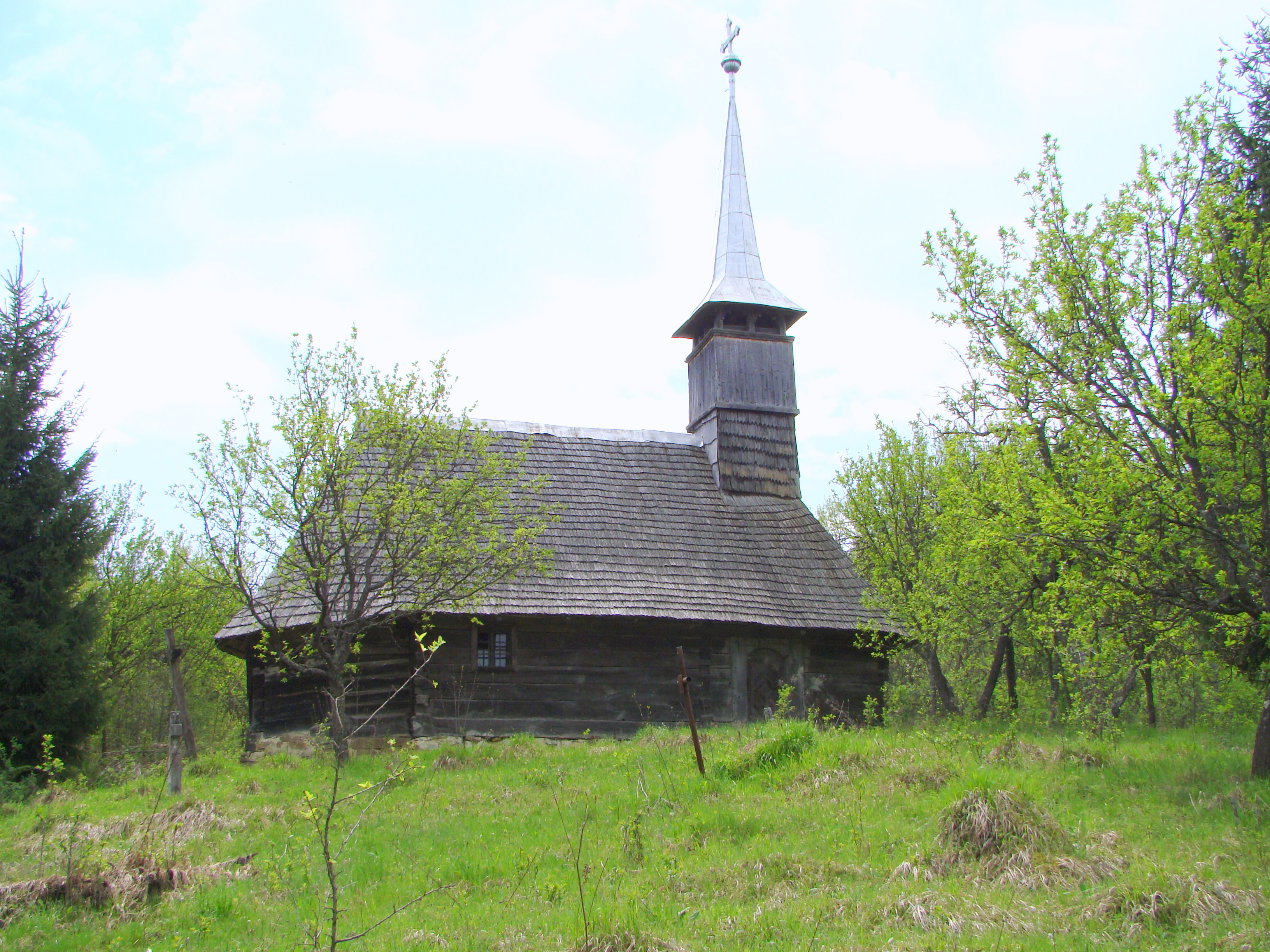 Biserica de lemn „Sf.Arhangheli” din Boiereni, județul Maramureș